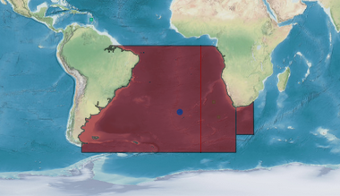 Útbreiðsla Eyjahornshumars